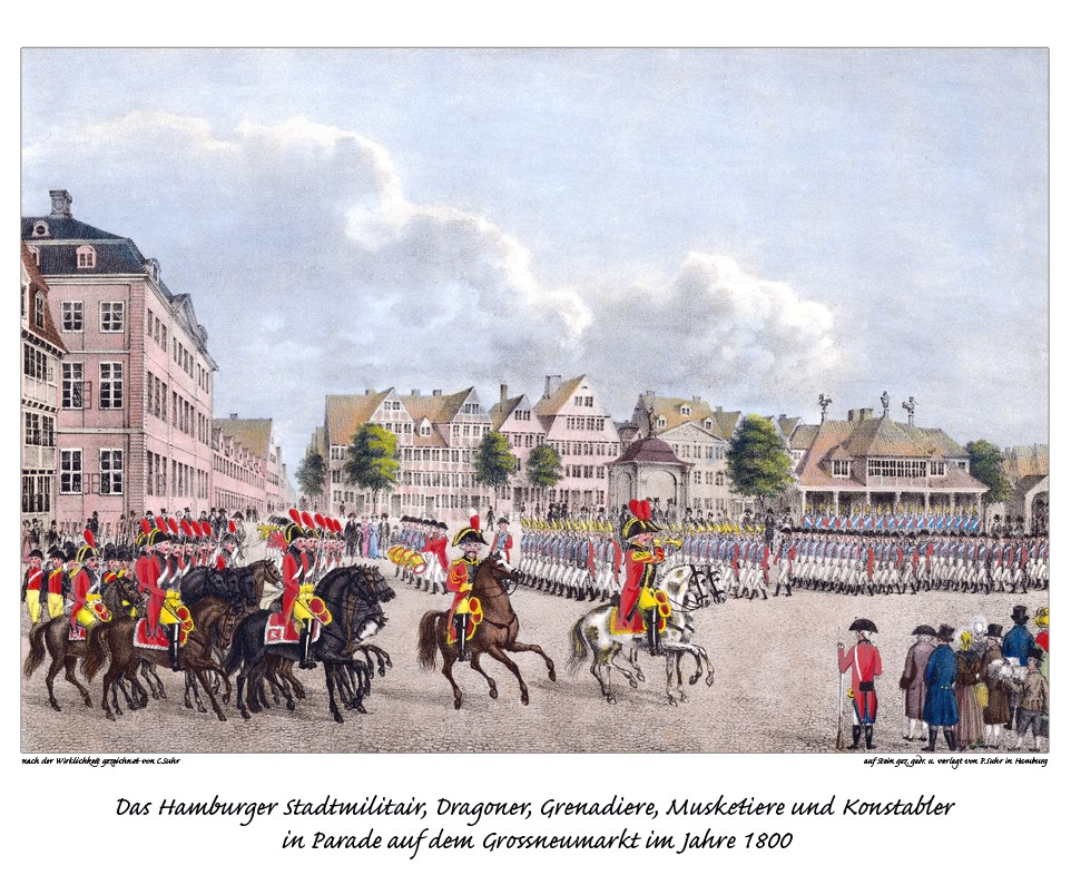 „Das Hamburger Stadtmilitair, Dragoner, Grenadiere, Musketiere und Konstabler in Parade auf dem Grossneumarkt im Jahre 1800.“